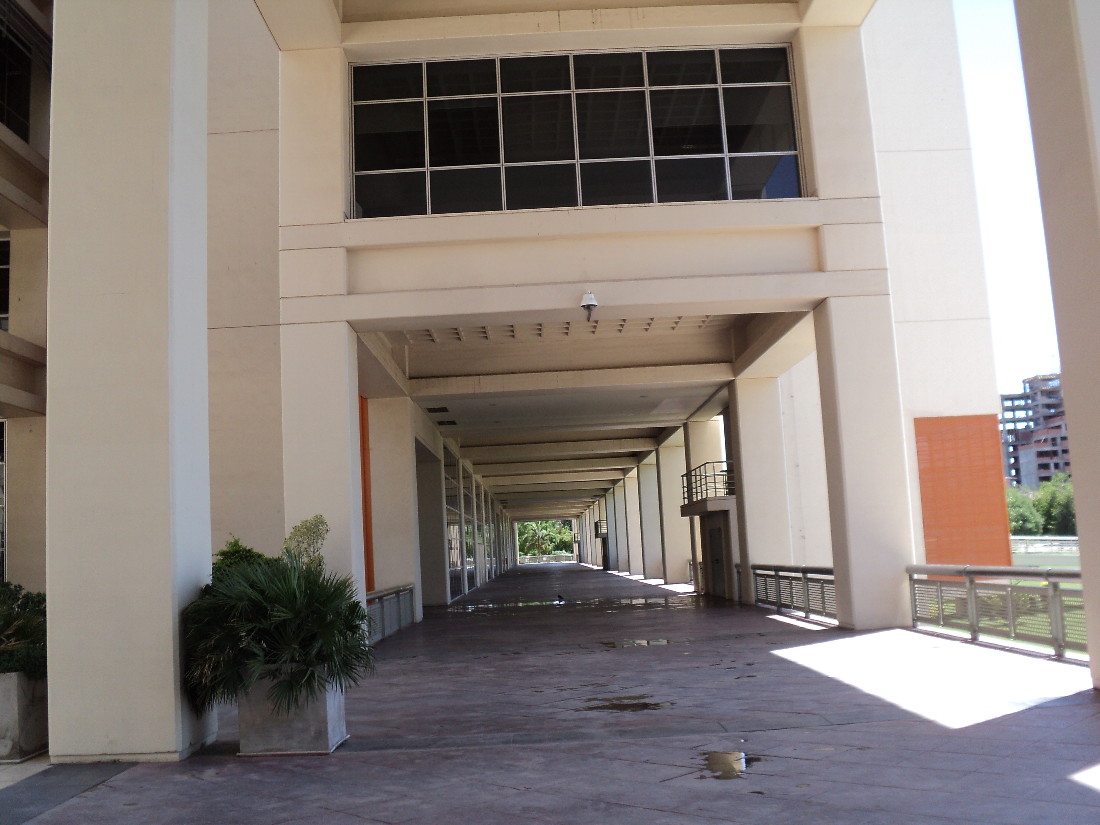 los pasillos de la planta baja del centro cívico